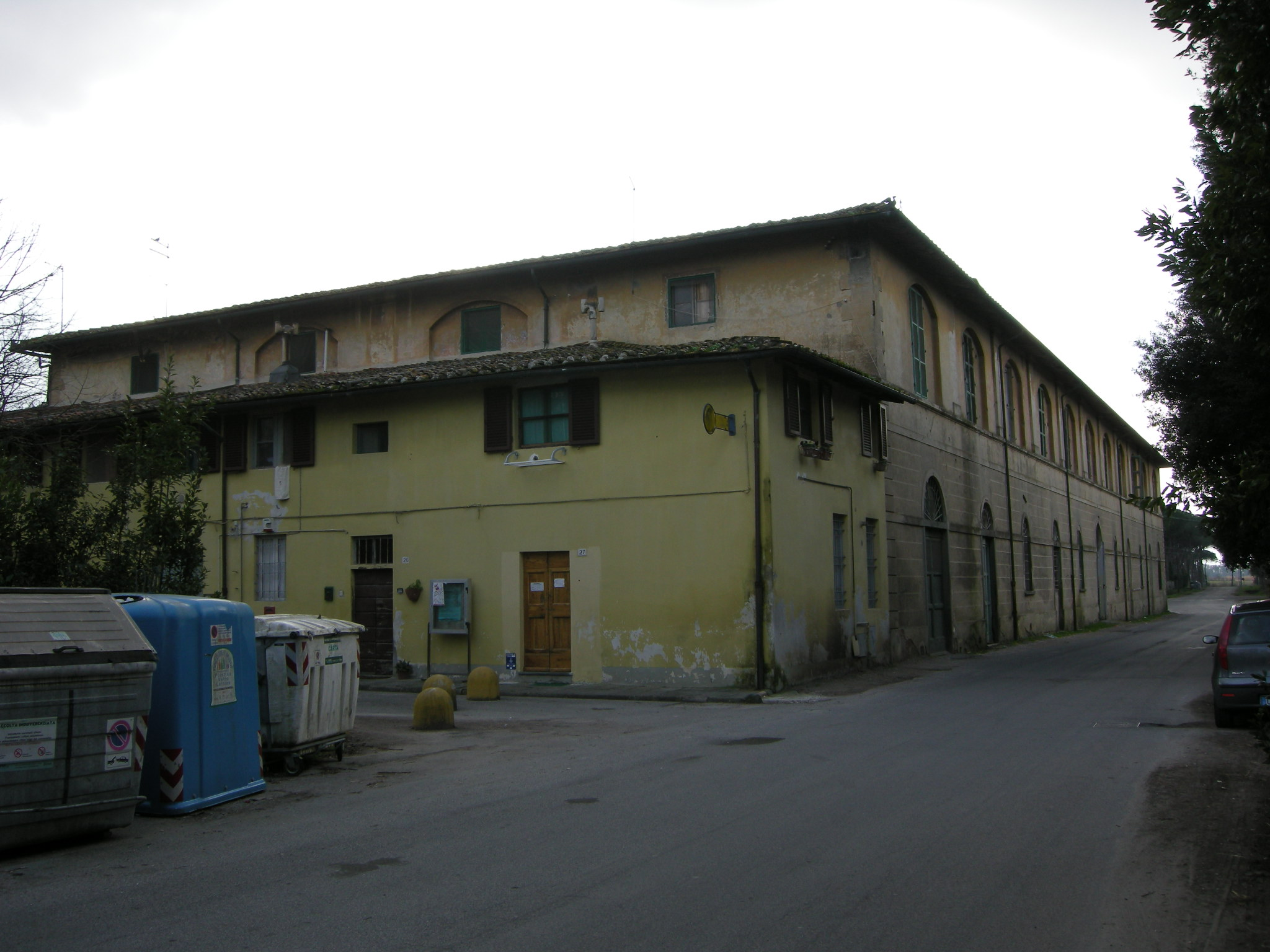 Villa di coltano, edificio agricolo